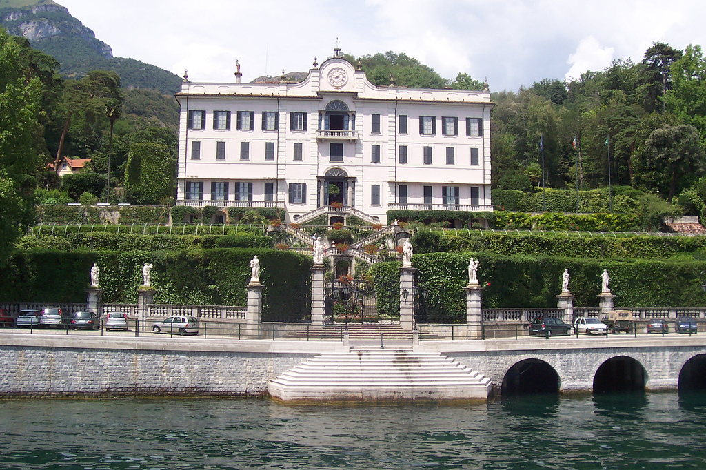 Villa Carlotta - Lac de Côme en Iatlie